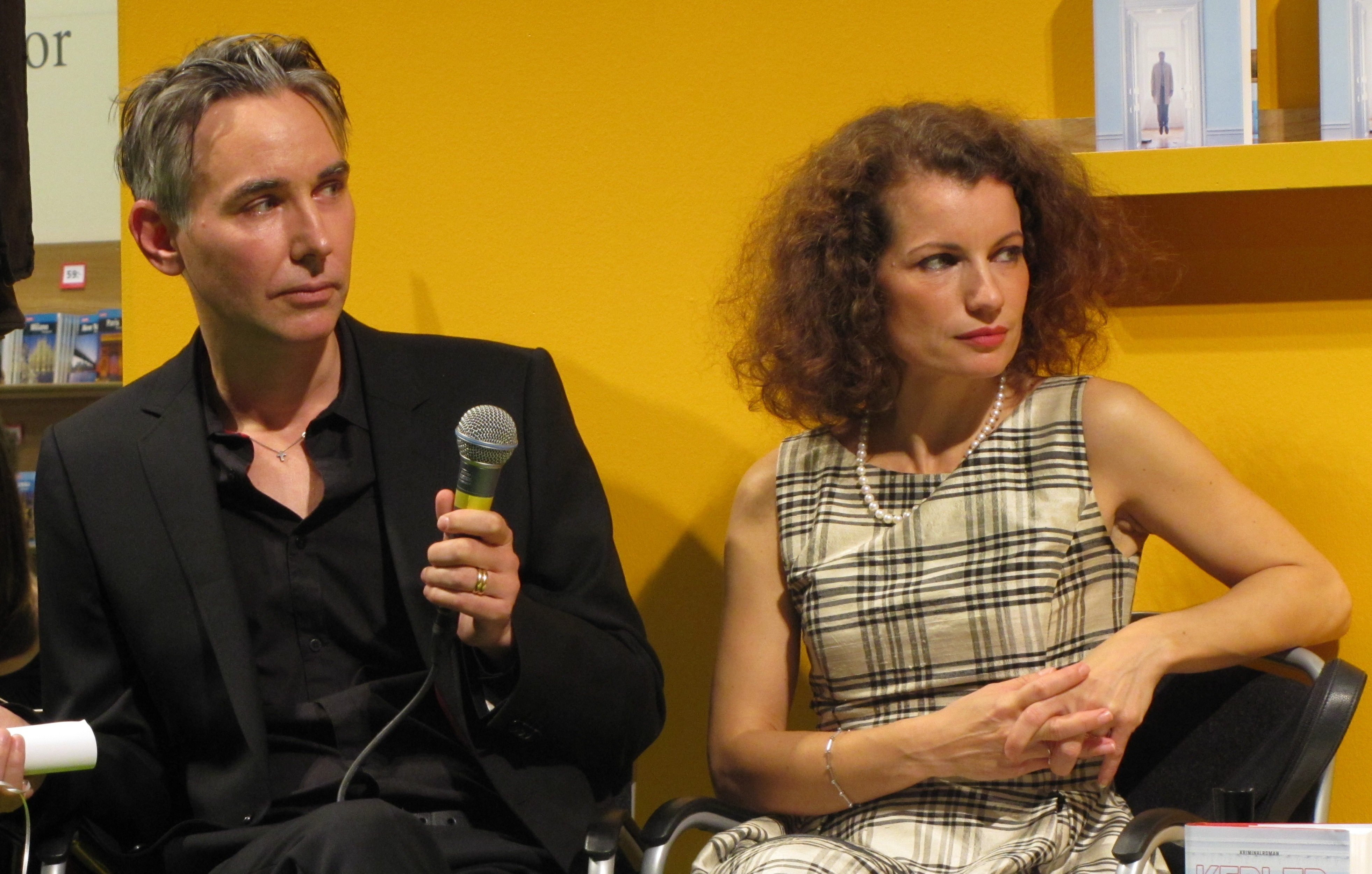 Lars Kepler, författarpseudonym för Alexander Ahndoril och Alexandra Coelho Ahndoril.